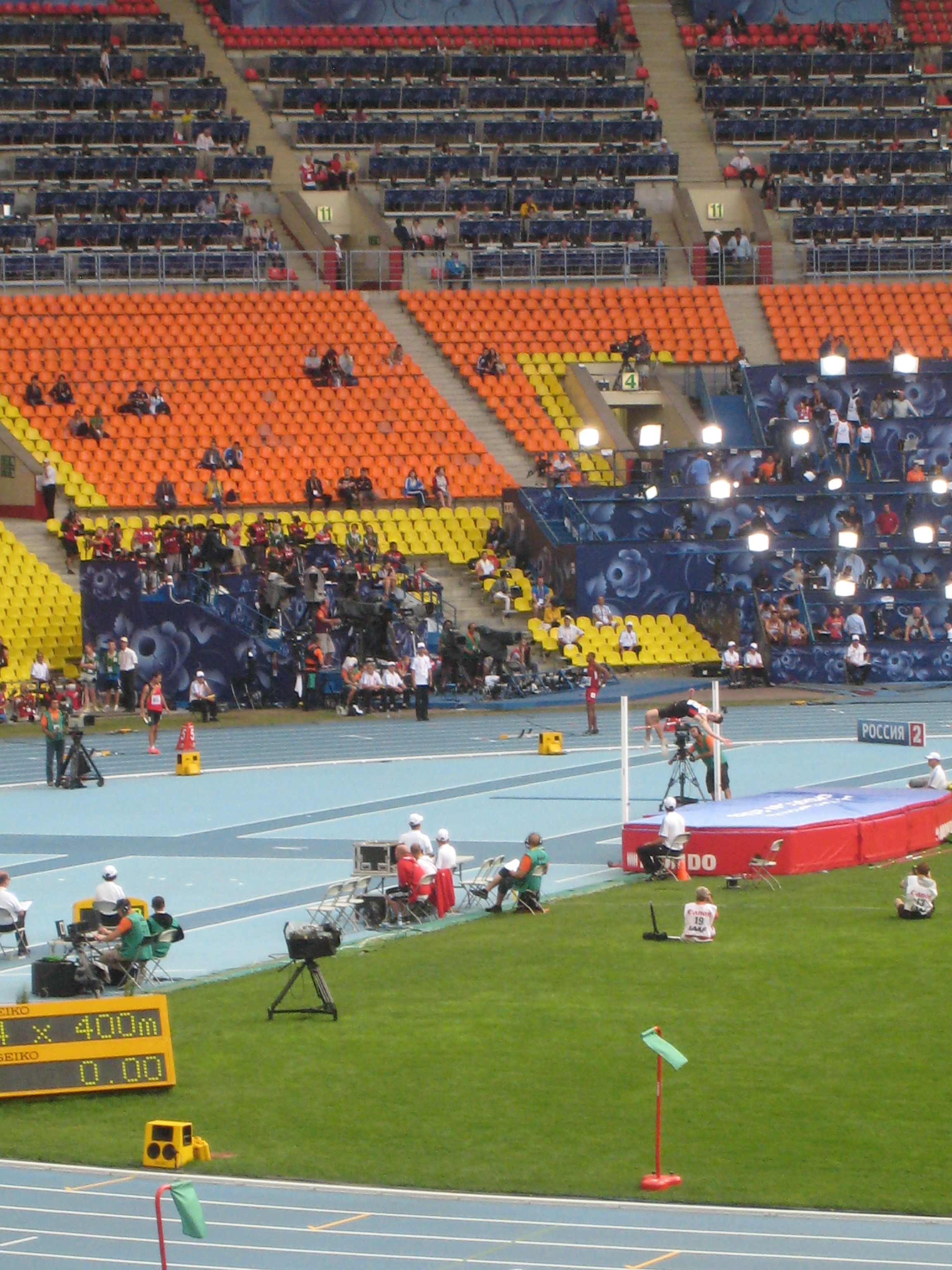 Чемпионат мира по лёгкой атлетике 2013. Канадский прыгун в высоту Дерек Друен